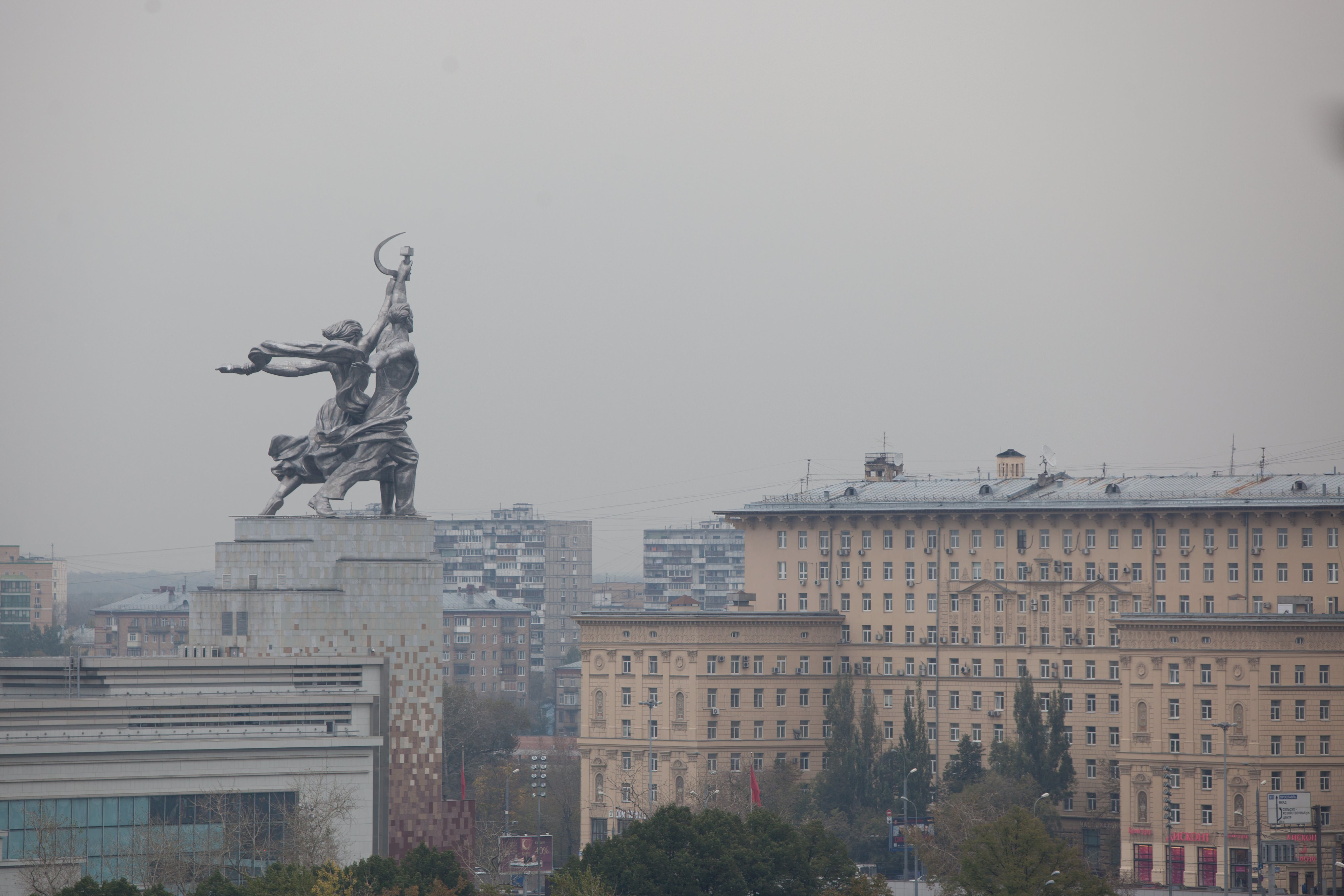 VDNKh (All-Russian Exhibition Center); Выставка достижений народного хозяйства (ВДНХ); Ausstellung der Errungenschaften der Volkswirtschaft (WDNCh)